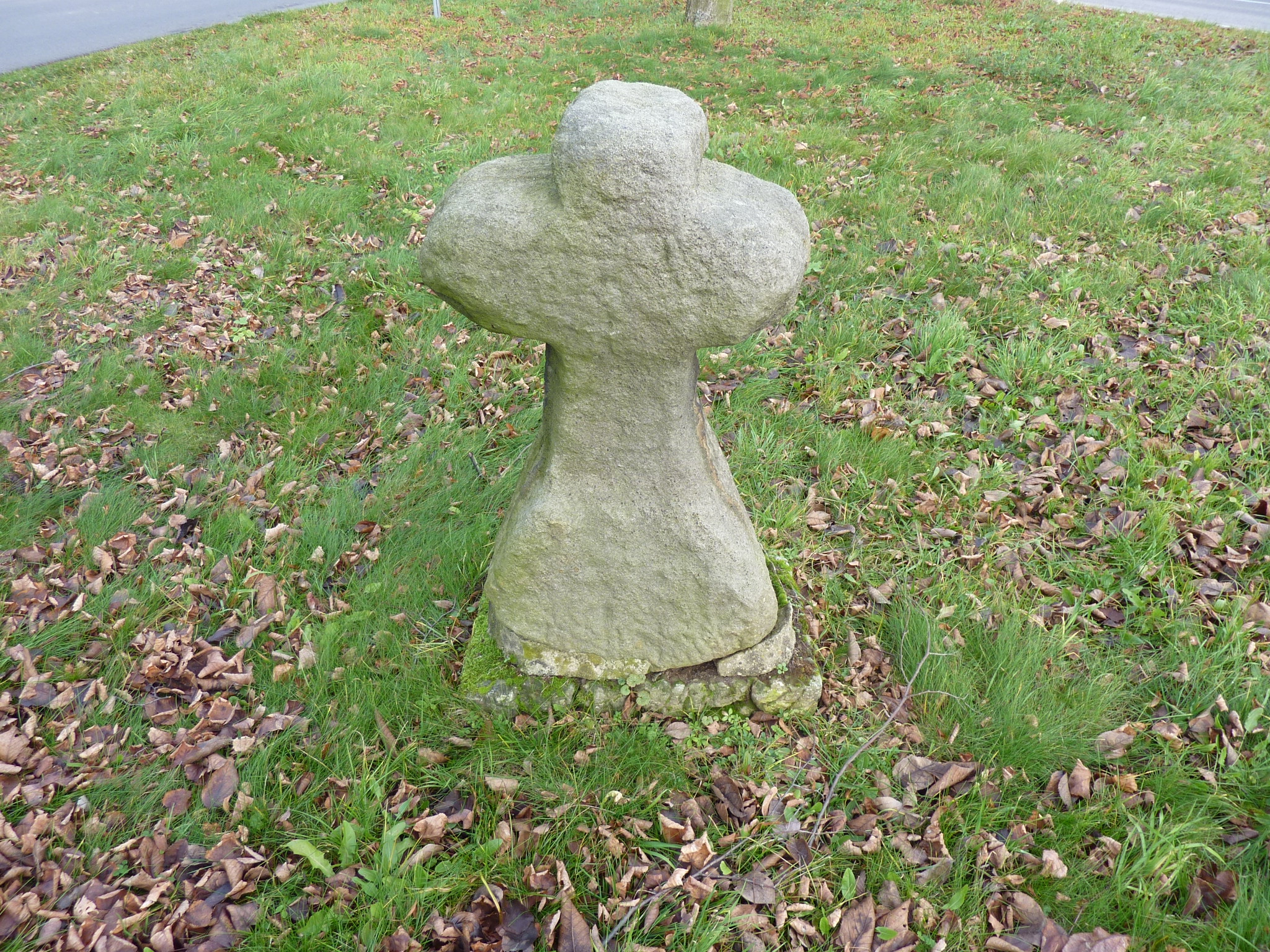 Sühnekreuz in Waltersdorf, Gemeinde Heideblick